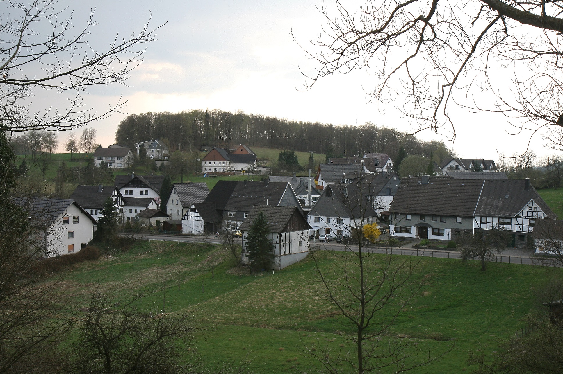 Blick auf Drolshagen-Wegeringhausen.